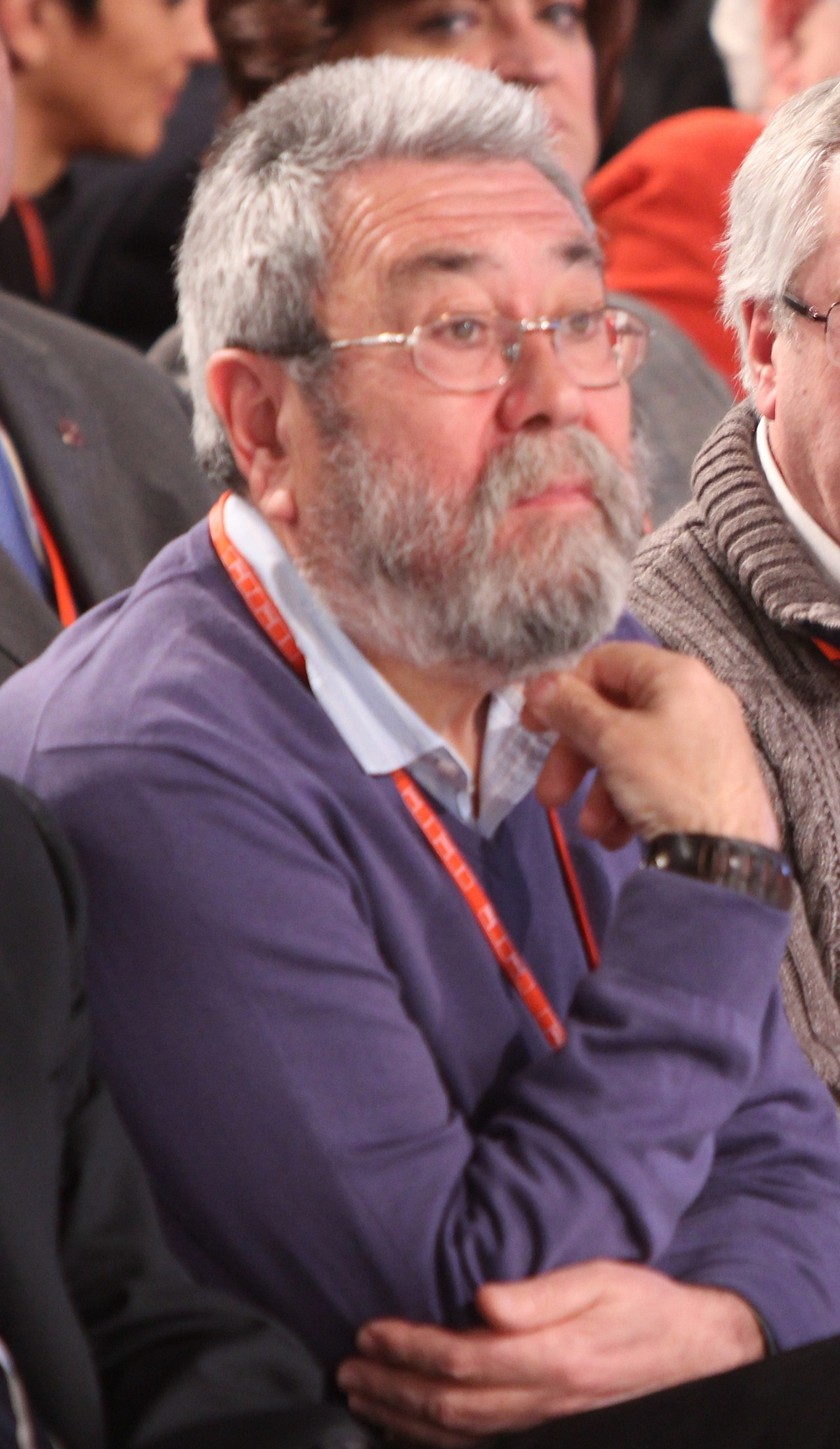 Cándido Méndez en la clausura del 38 Congreso del PSOE